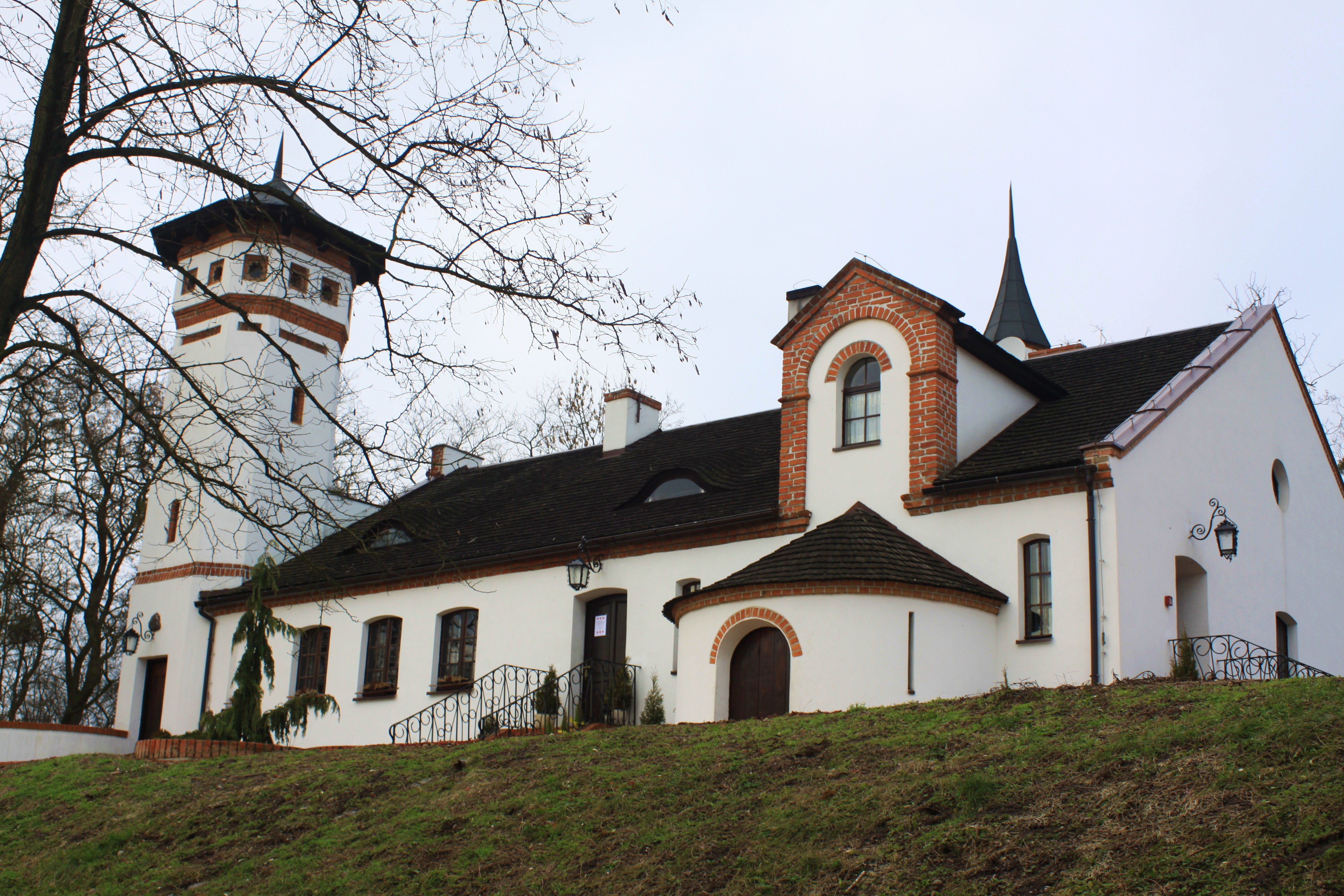 Bugaj, zameczek myśliwski "Bażantarnia", poł. XIX